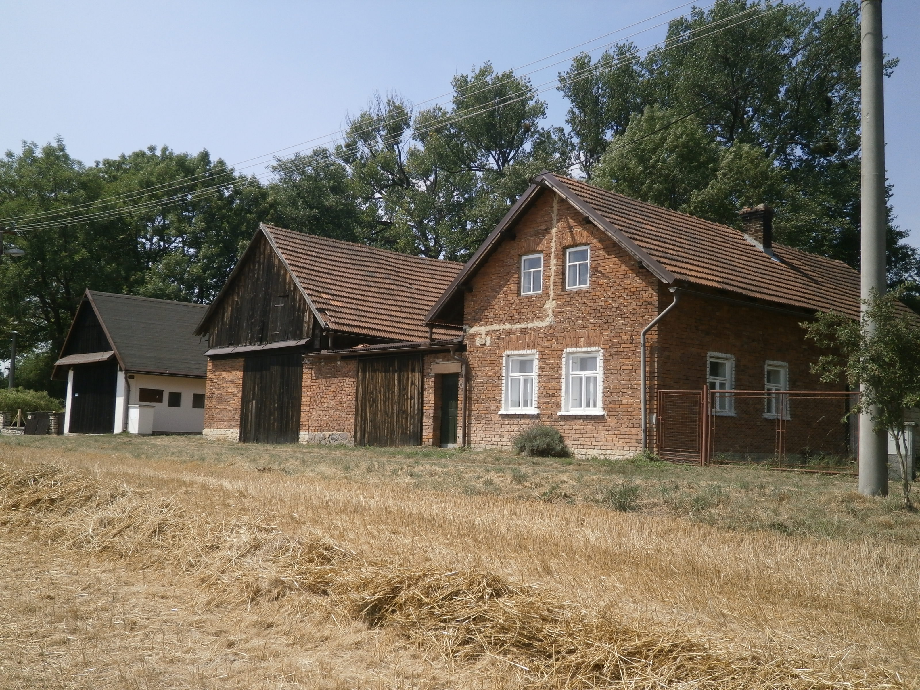 Rybníček - č.p. 37